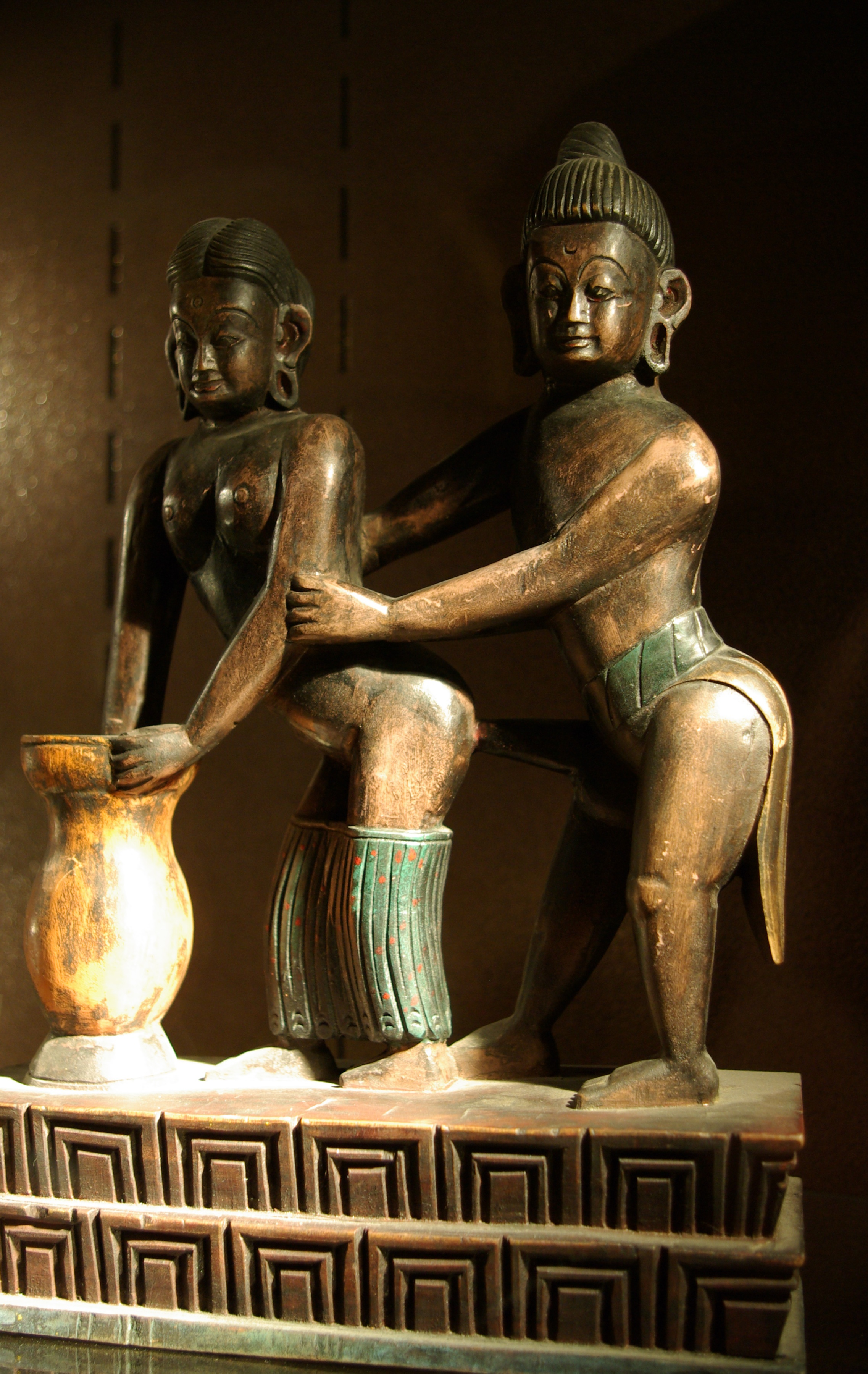 Holzfigur aus Nepal (20. Jahrhundert) im Musée de l'érotisme in Paris